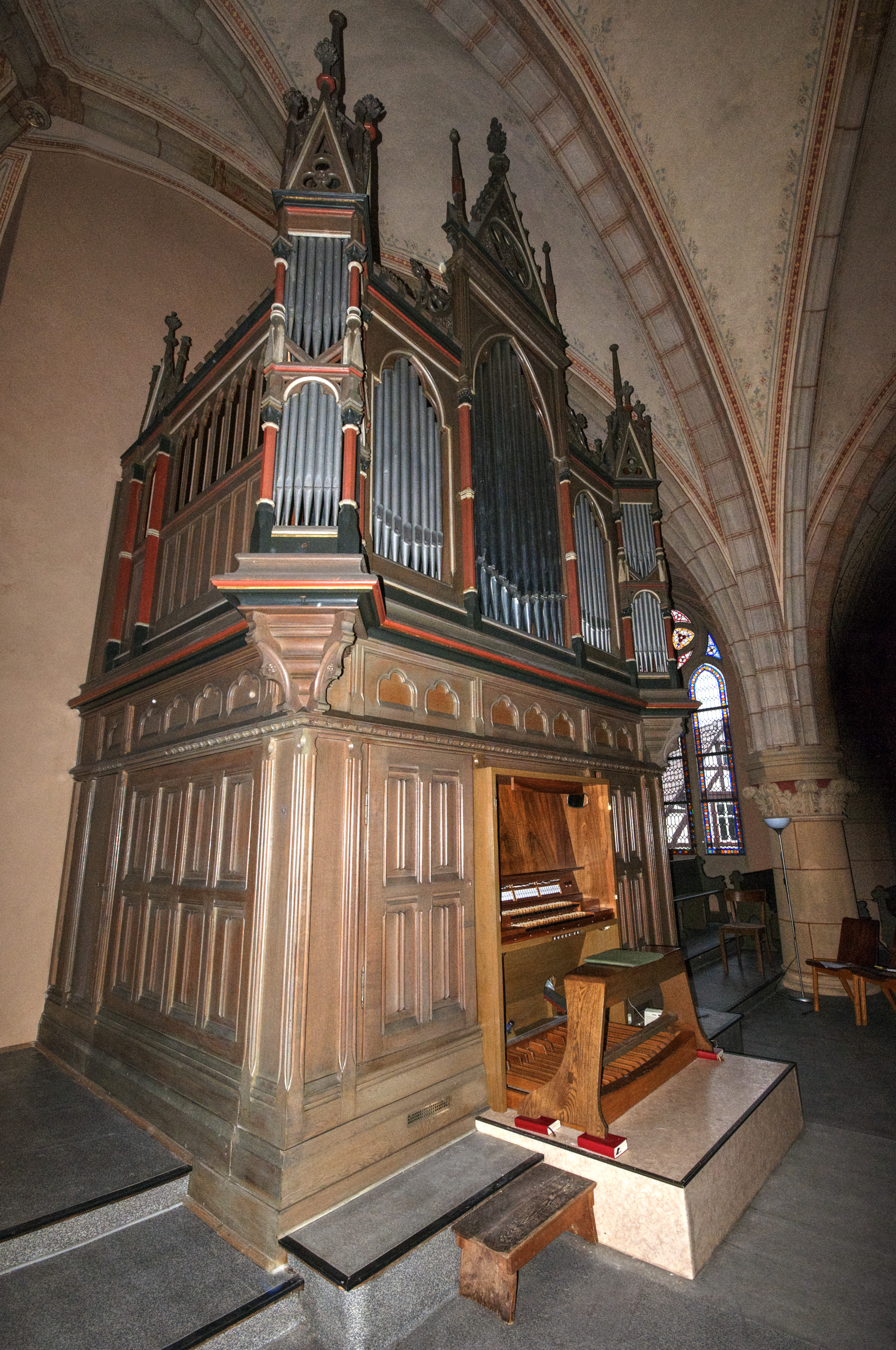 ev. Stadtkirche Wanfried, die Orgel links